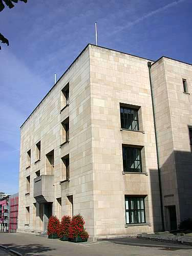 Raadhuis Raadhuisplein/Geleenstraat 27, Heerlen, Frits Peutz